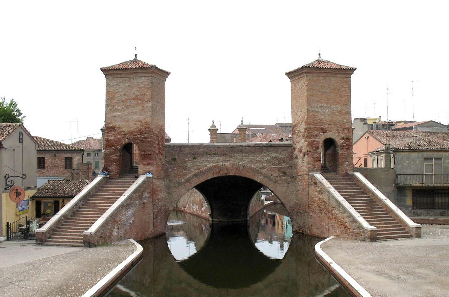 Comacchio, Emilia Romagna, Italia Trepponti